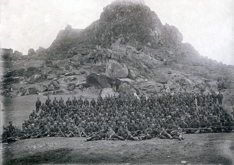 Рота от 58-и пех. полк. Маркови кули (Прилеп). 1916 г.